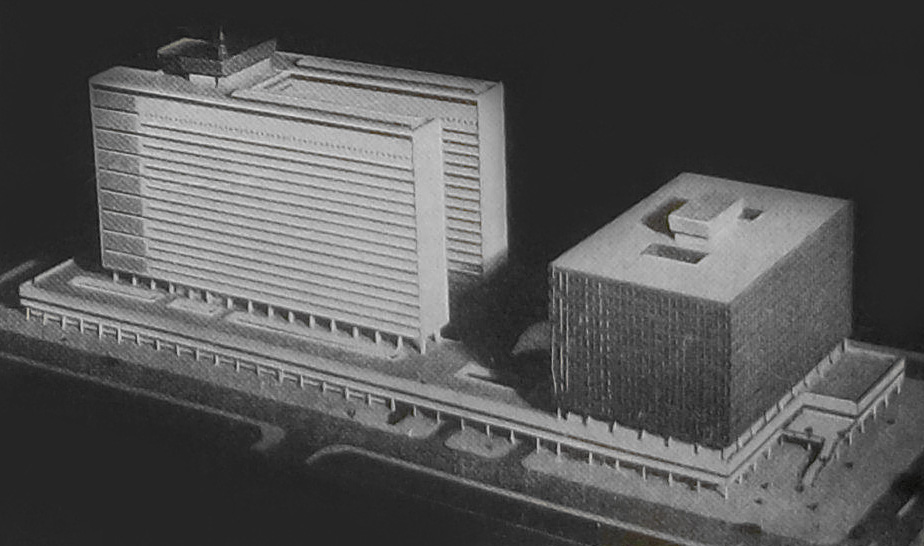 Fotografía de la maqueta del proyecto original de Polo Judicial de Buenos Aires. Las torres gemelas de la Cárcel de Encausados se inauguraron en 1979 y se demolieron en 2004, el edificio de los Tribunales jamás fue concluido, en su lugar se construyó el Hospital de Pediatría Juan Garrahan. Buenos Aires, Argentina.